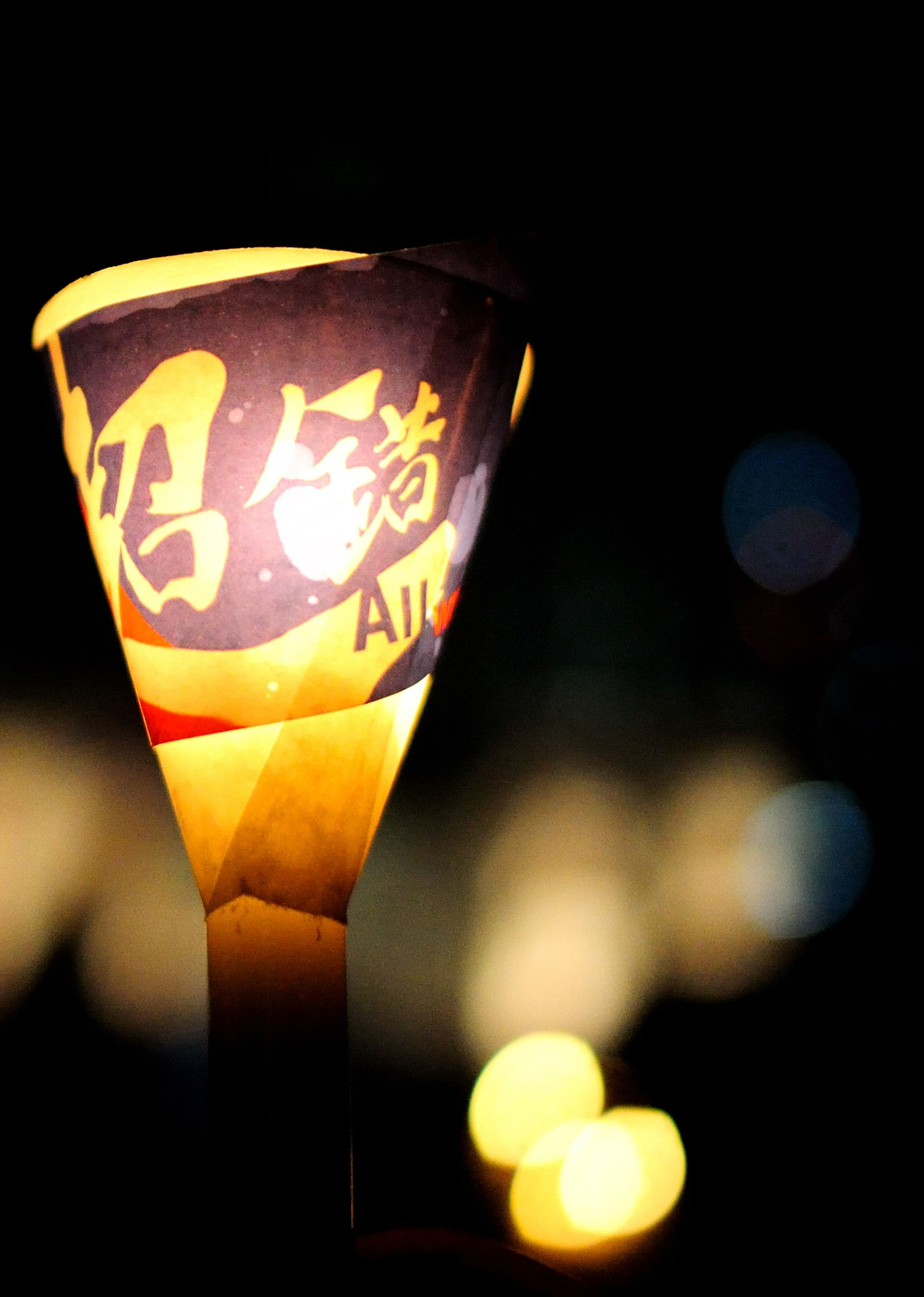 維園平反六四21週年燭光晚會 2010